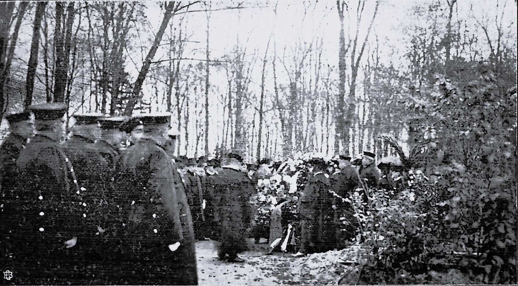 Auf dem allgemeinen Gottesacker wird der Sarg Brechts in die Erde gesenkt.